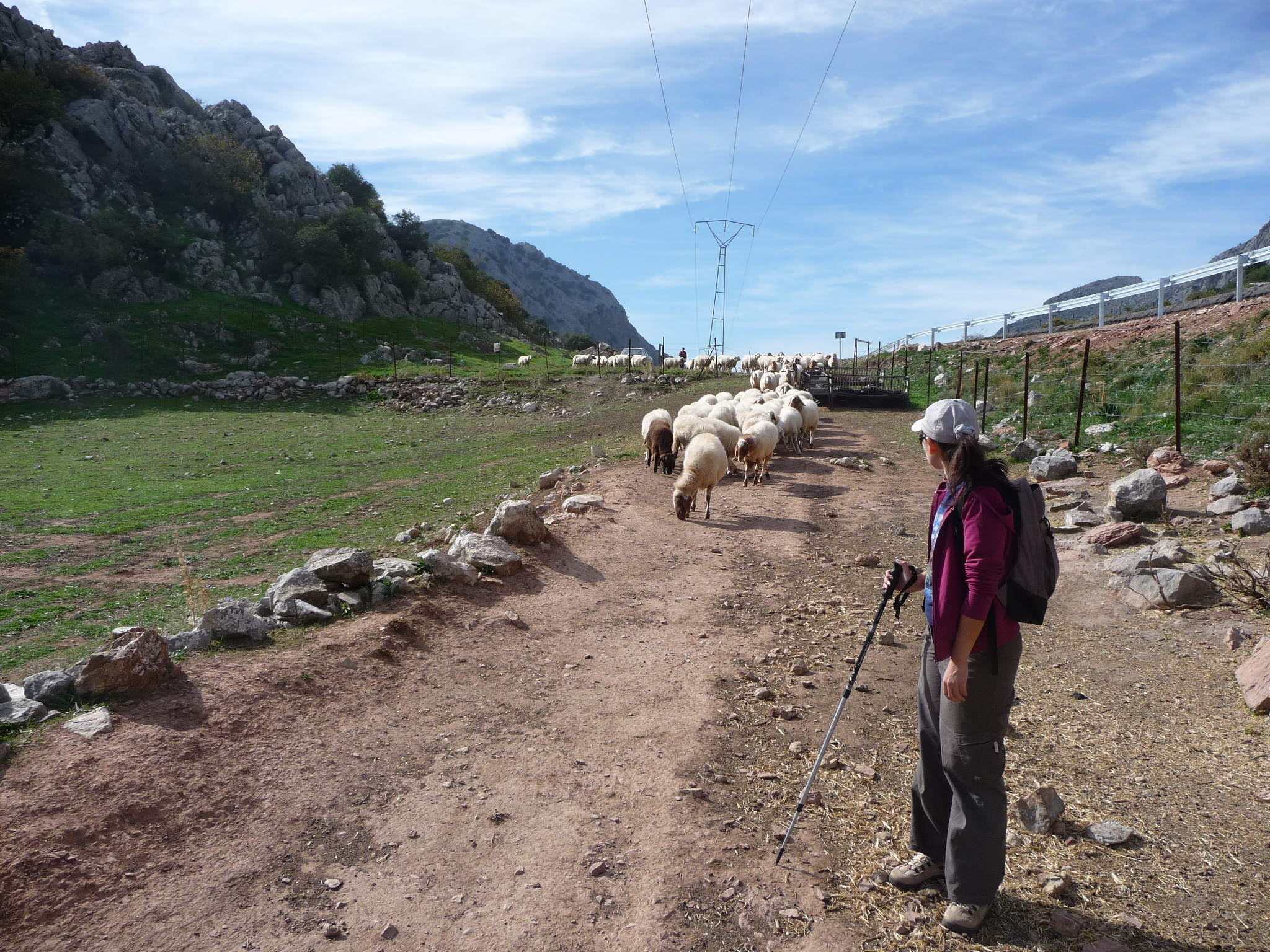 Manga de Villauenga (Andalucía, España)